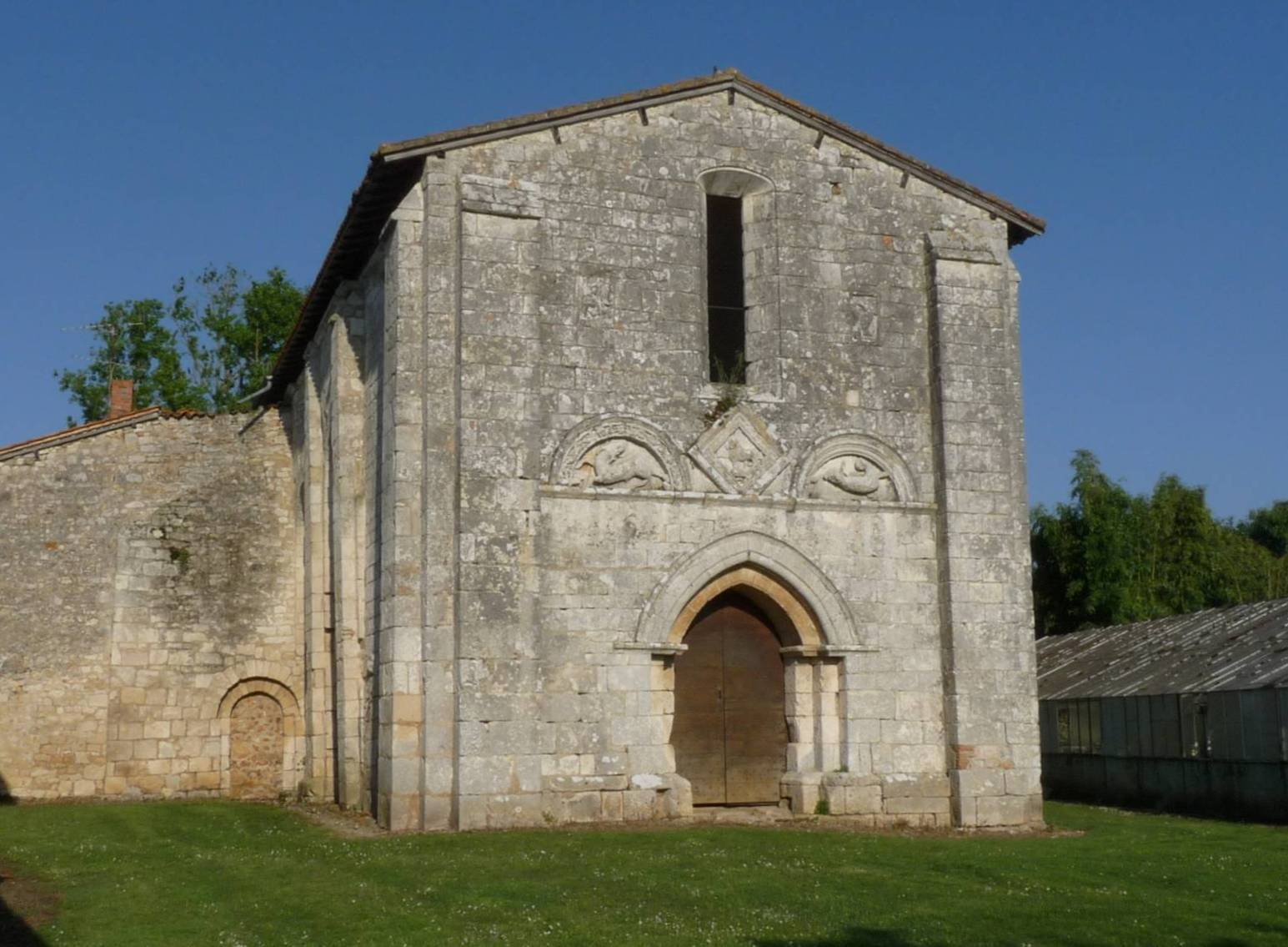 Eglise d'Olérat, La Rochefoucauld, Charente, France